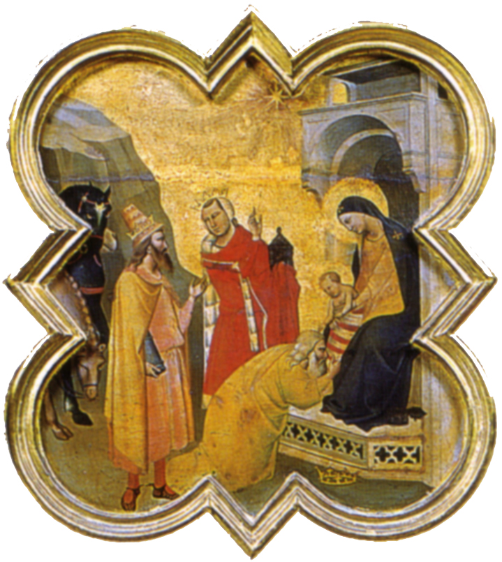 Taddeo gaddi, formelle dell'armadio della sacrestia di santa croce, 02 adorazione dei magi